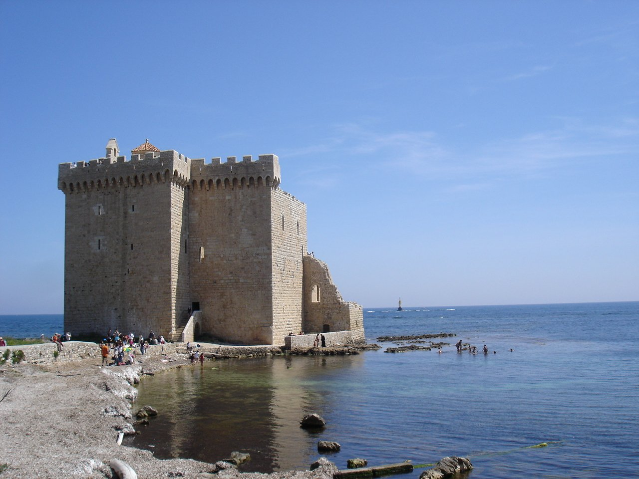 Forteresse de l'ile Saint-Honorat (Alpes-Maritimes, France)